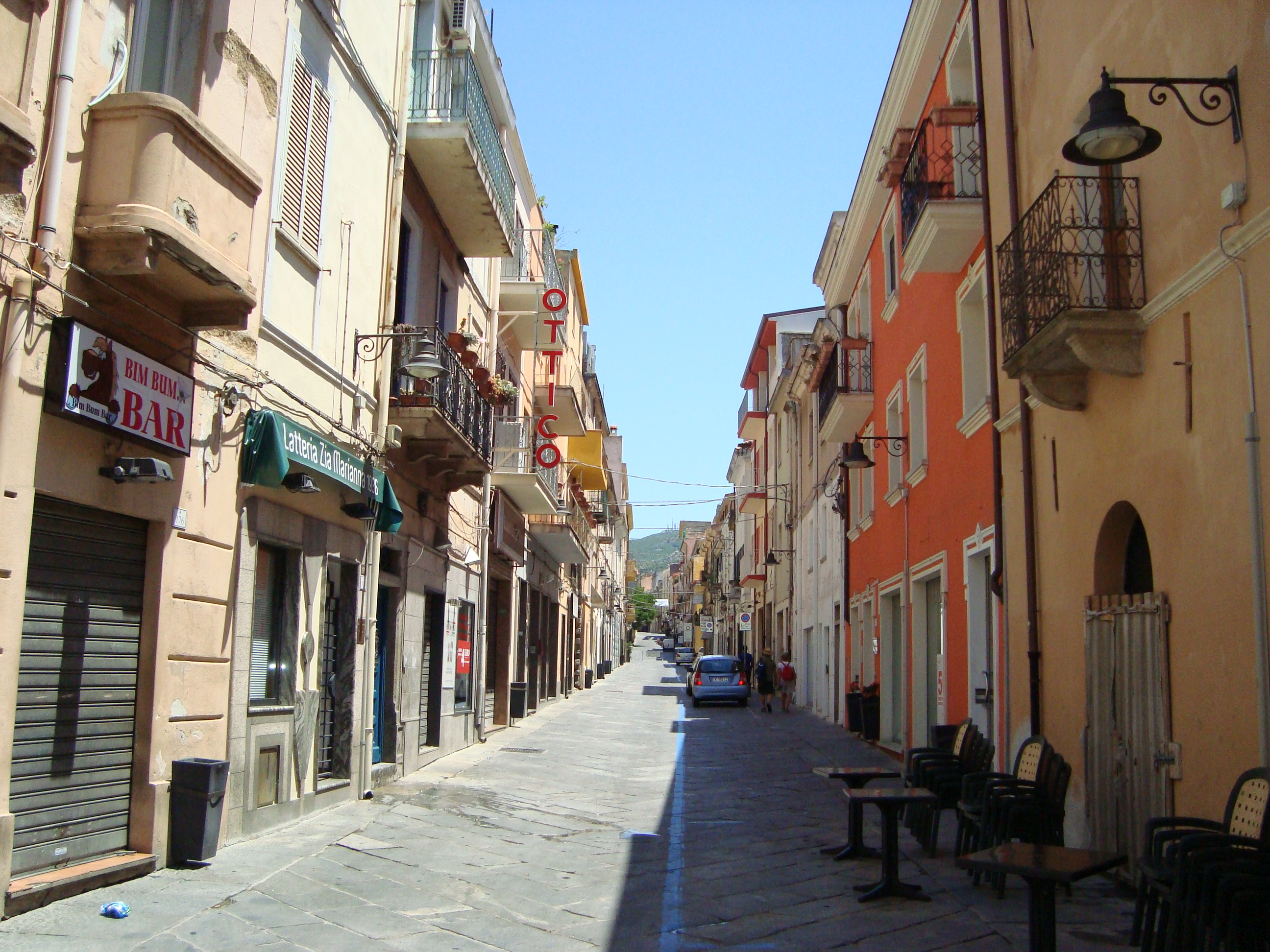 Nuoro